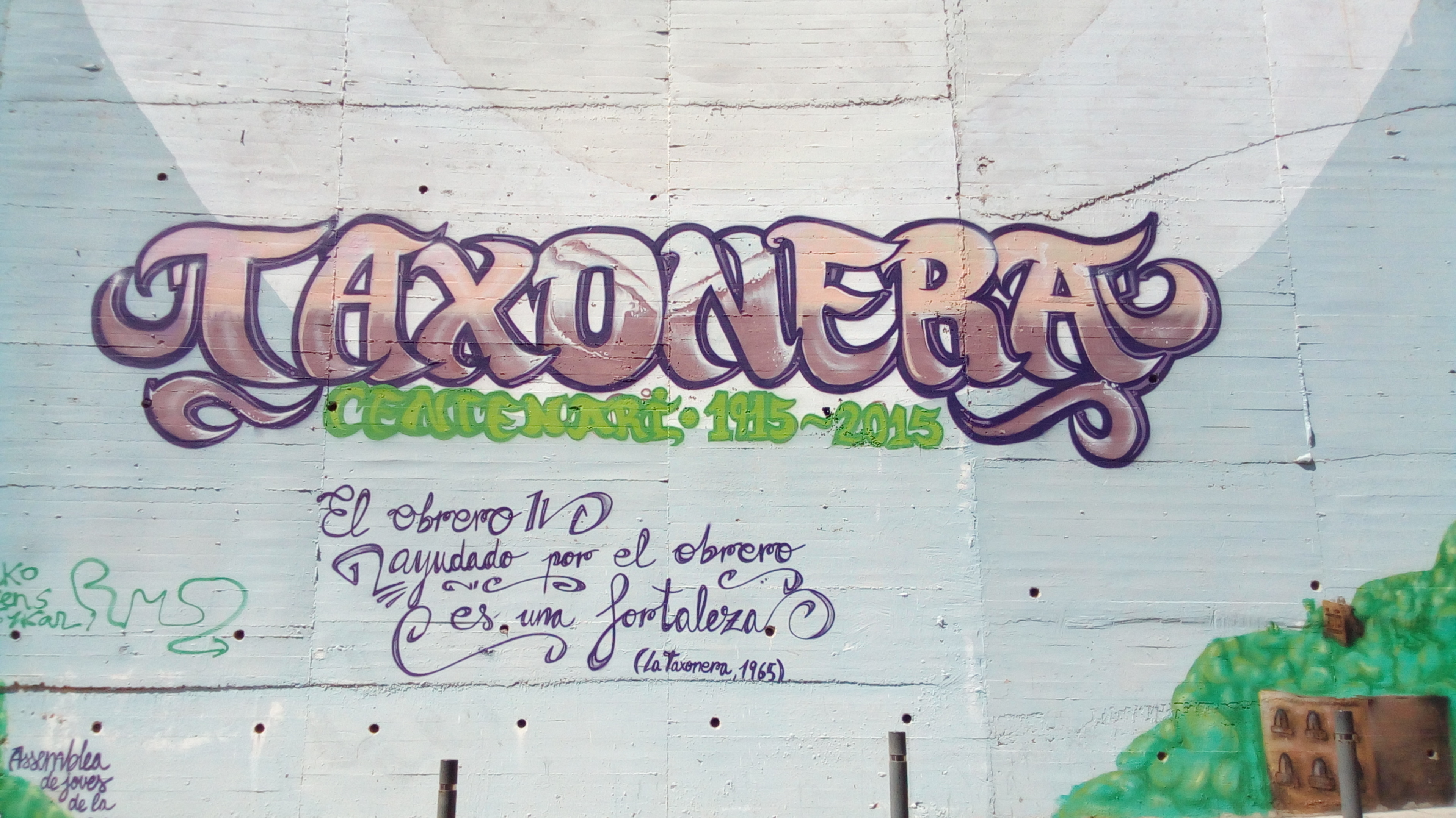 Graffiti de la Taxonera.